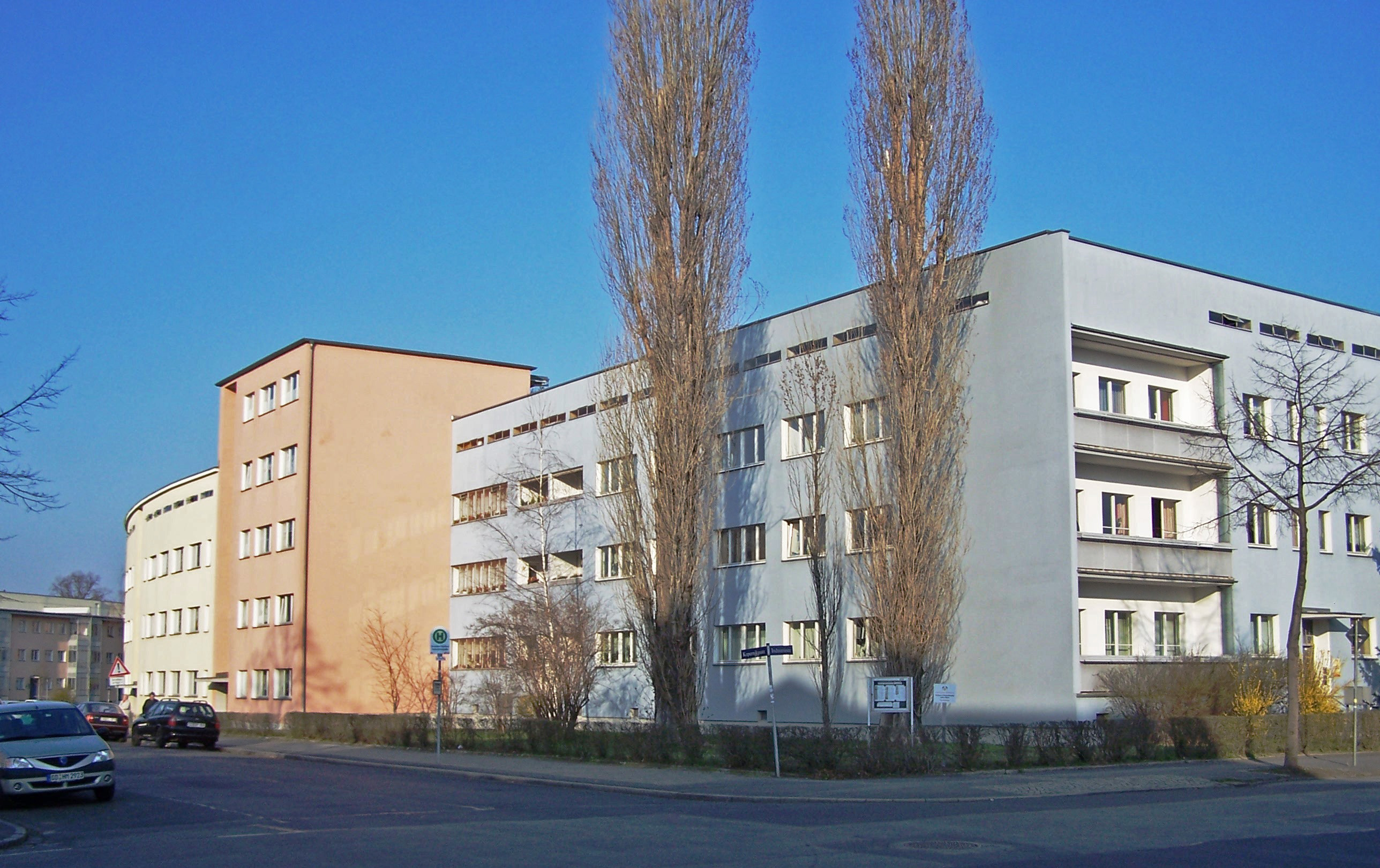 Großsiedlung Trachau in Dresden, Stil: Neue Sachlichkeit, Architekten: Hans Richter, Hans Waloschek, Schilling & Graebner, Carl Rade (Maler), Ernst Ufer, Willimartin Romberger